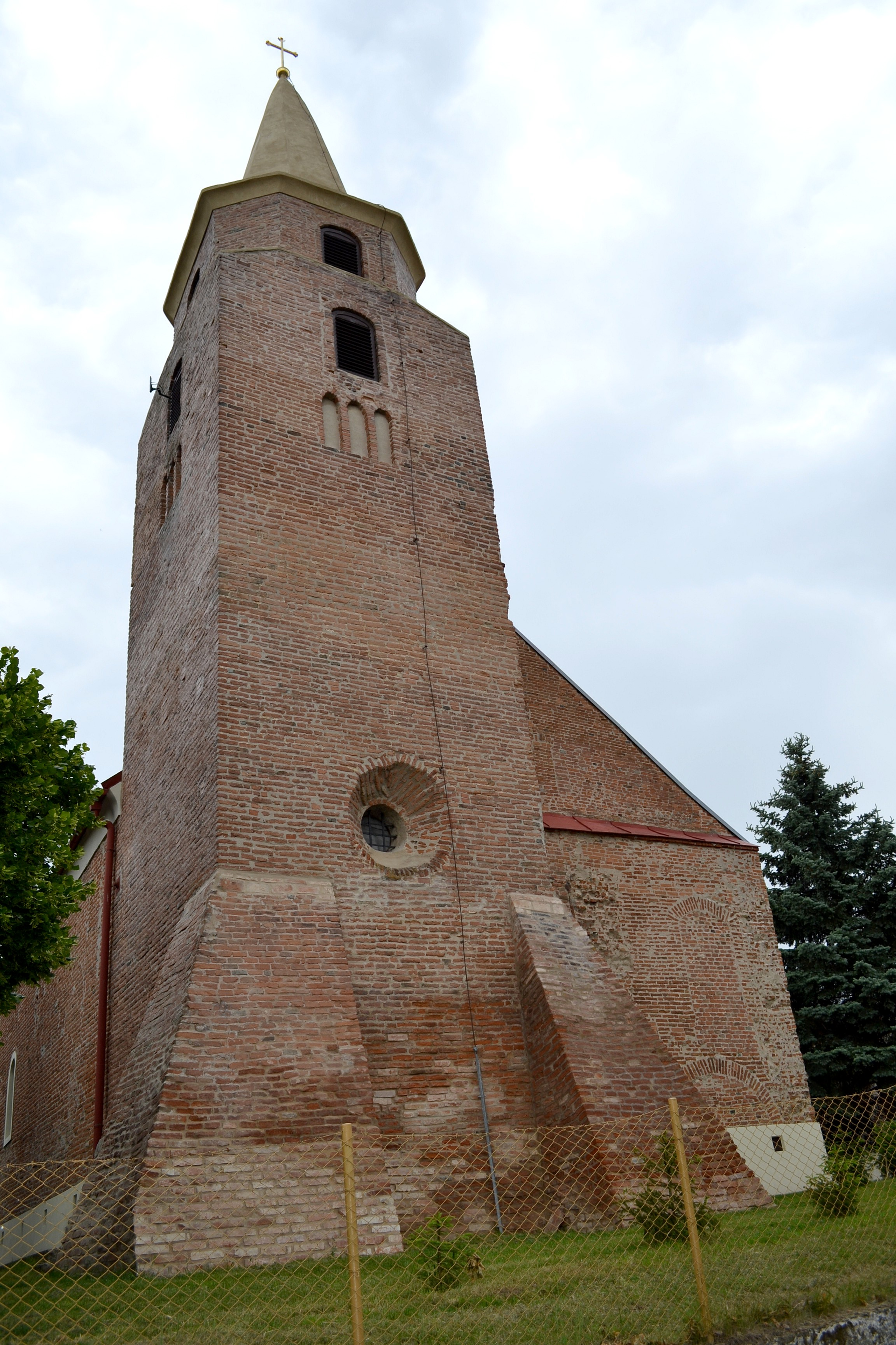 Kaplna, Kostol svätej Alžbety; veža kostola